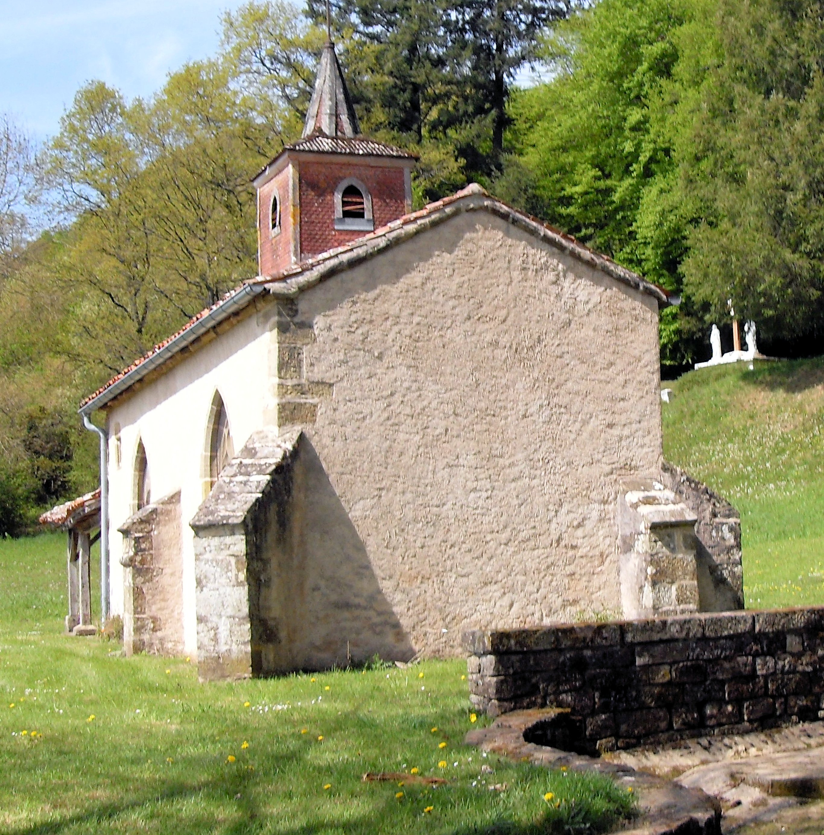 La chapelle Notre-Dame-de-Varouse à Rozières-sur-Mouzon